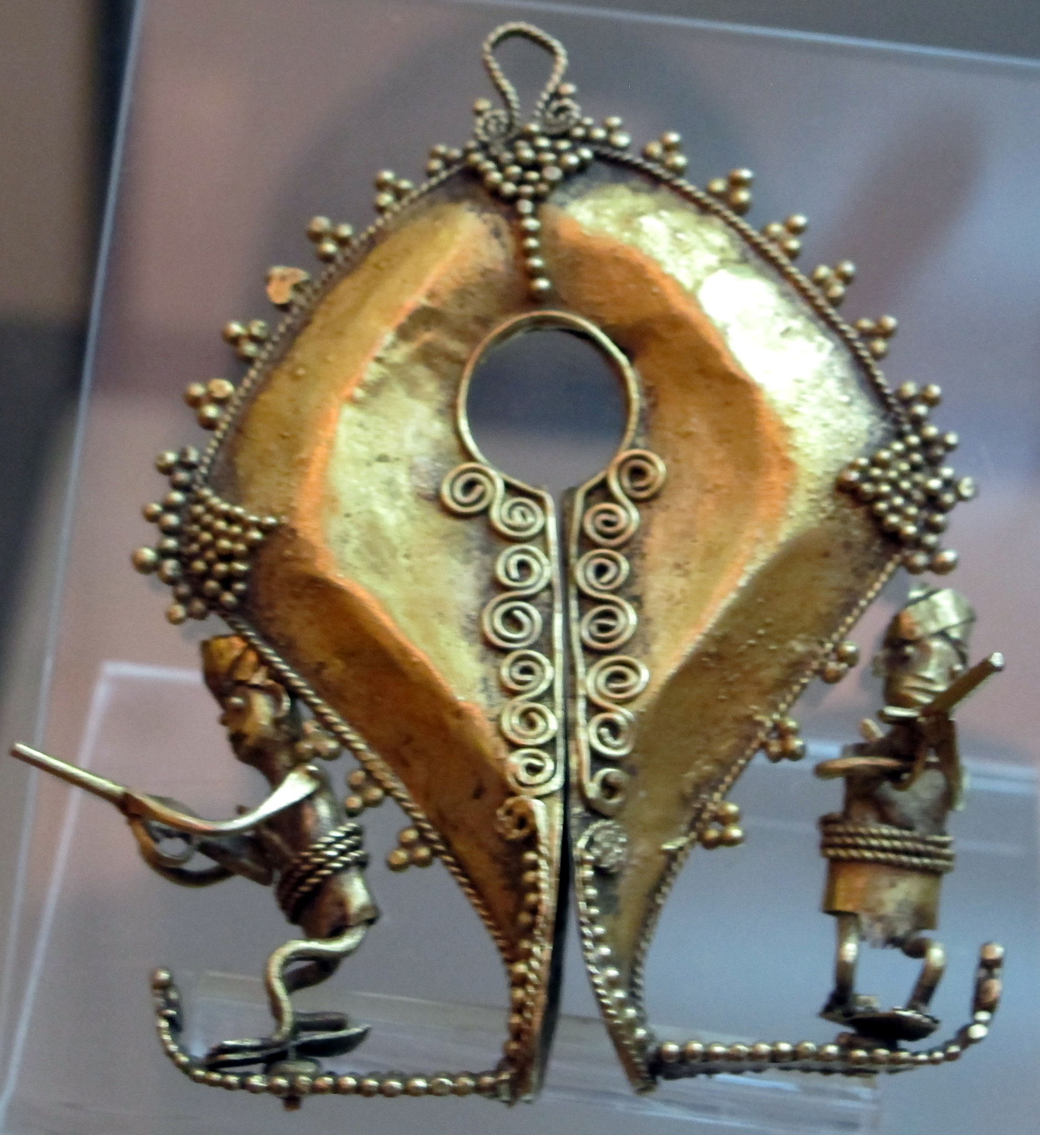 Isola di sumba, orecchino o pendente mamuli, xix-xx sec